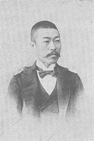 岡井藤之丞